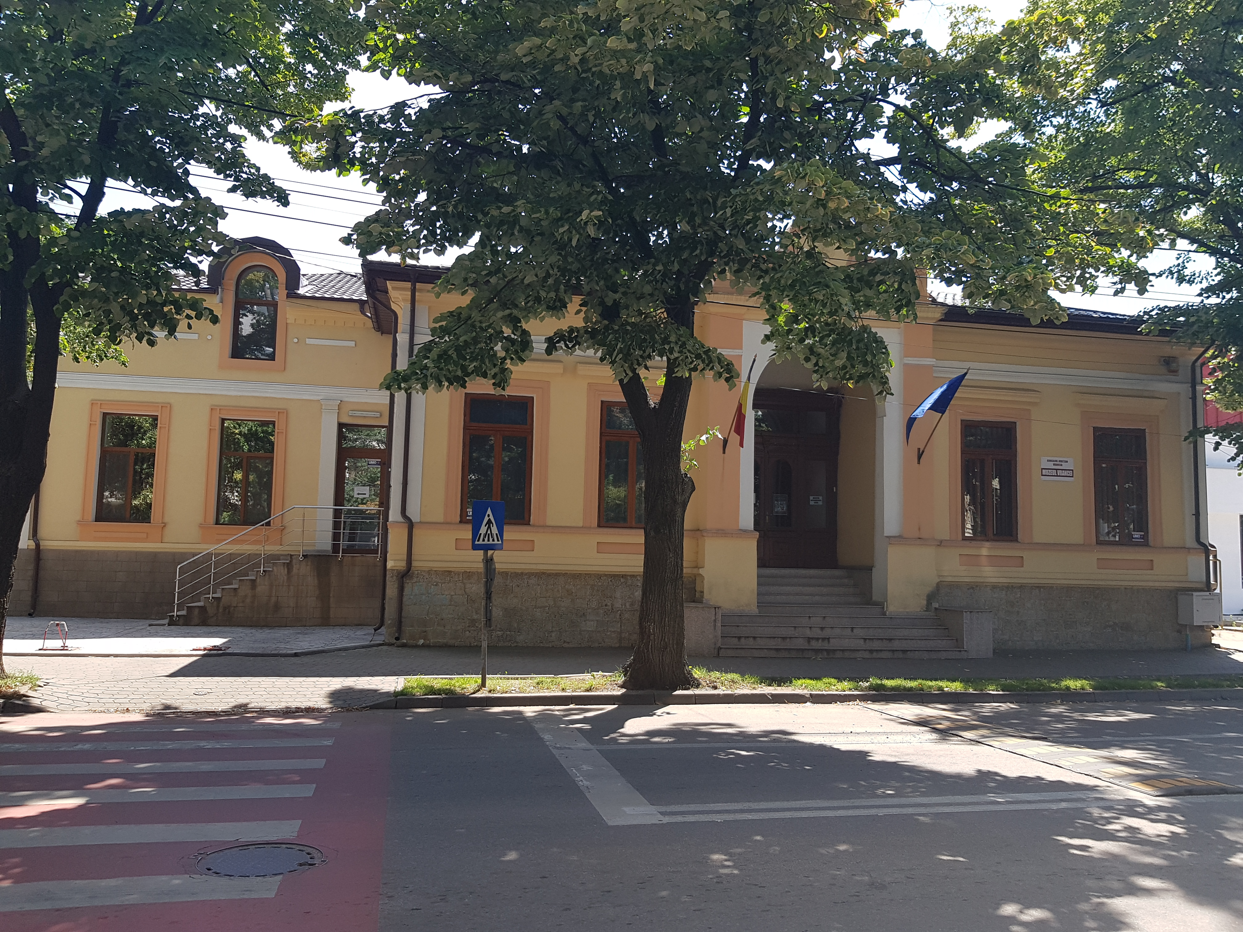 Casa baron Capri